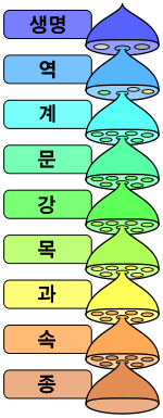 File:Biological classification L Pengo.svg 한국어 번역본